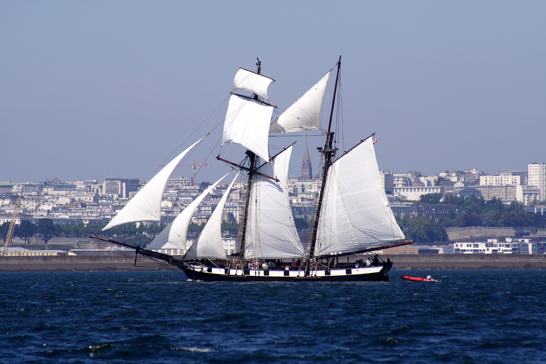 La Recouvrance navigue en rade en 2008 dans l'alignement du clocher de Saint-Martin